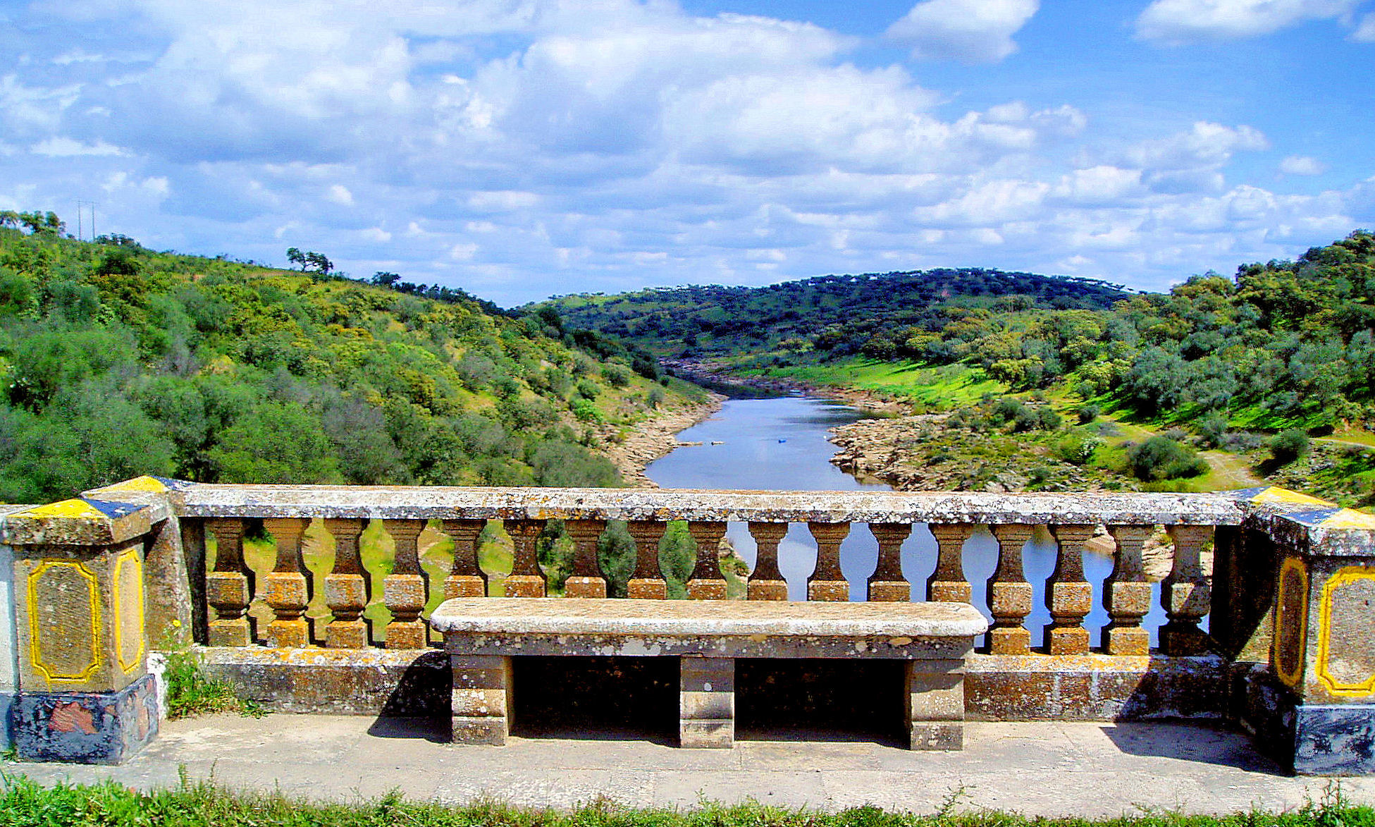 Ardila River. Moura, Portugal